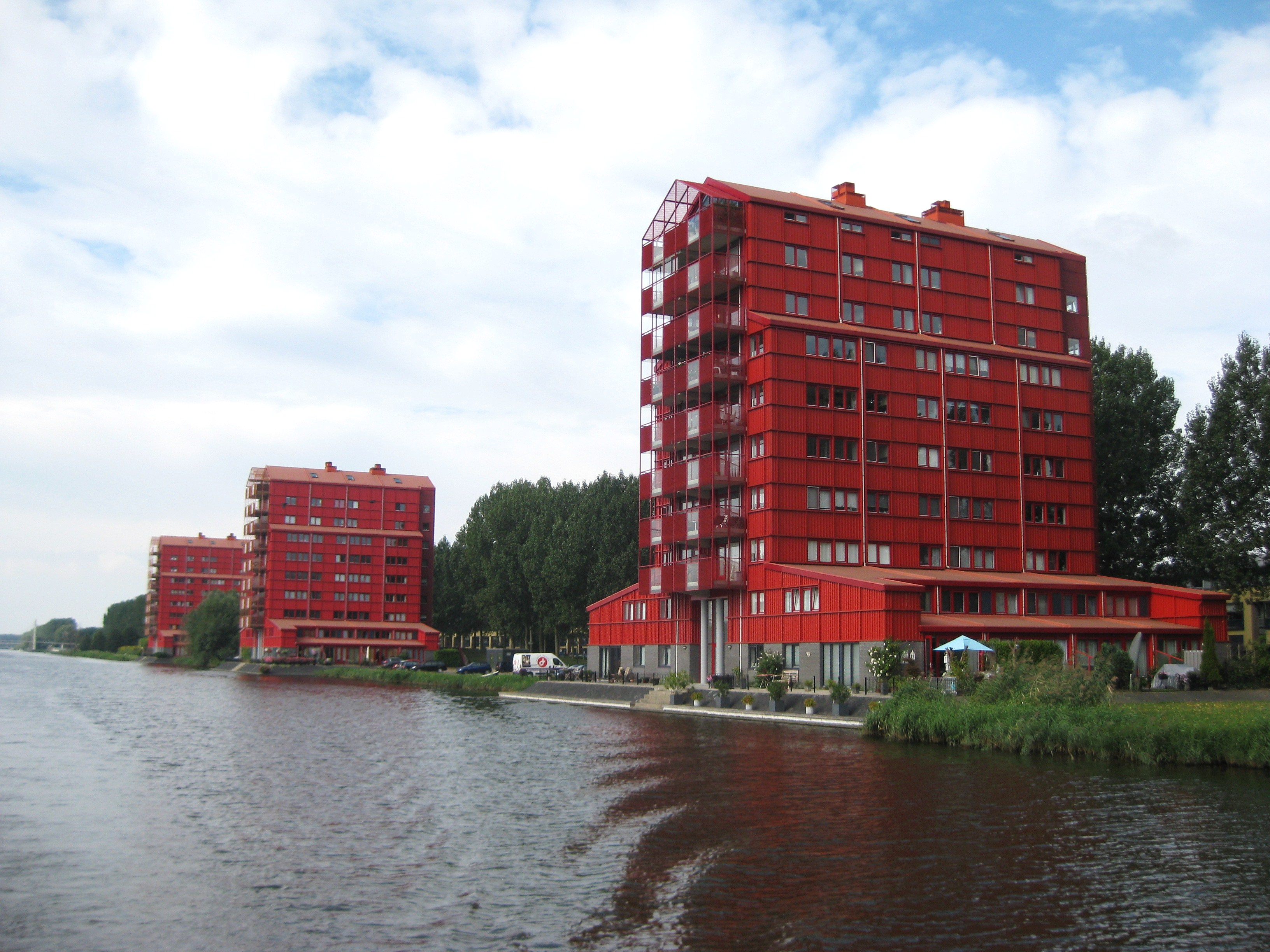 Flats langs de Lage Vaart in de Regenboogbuurt, Almere Buiten